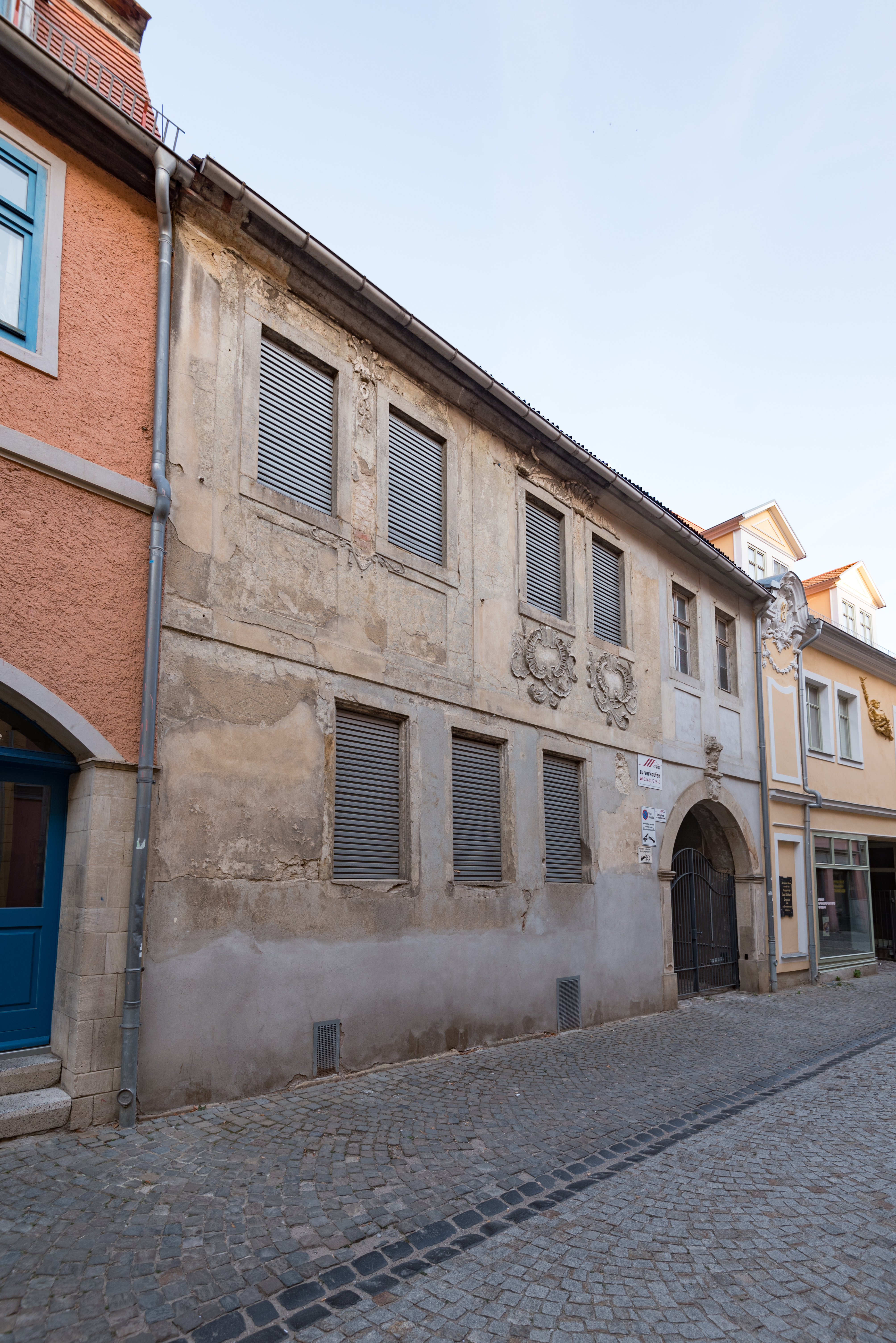 Naumburg (Saale), Wenzelsstraße 40